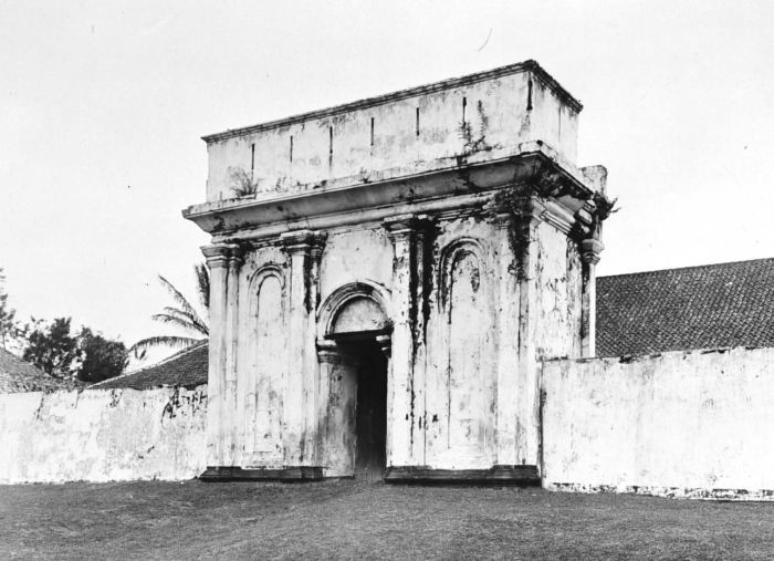 Repronegatief. Een poort van het fort te Palembang